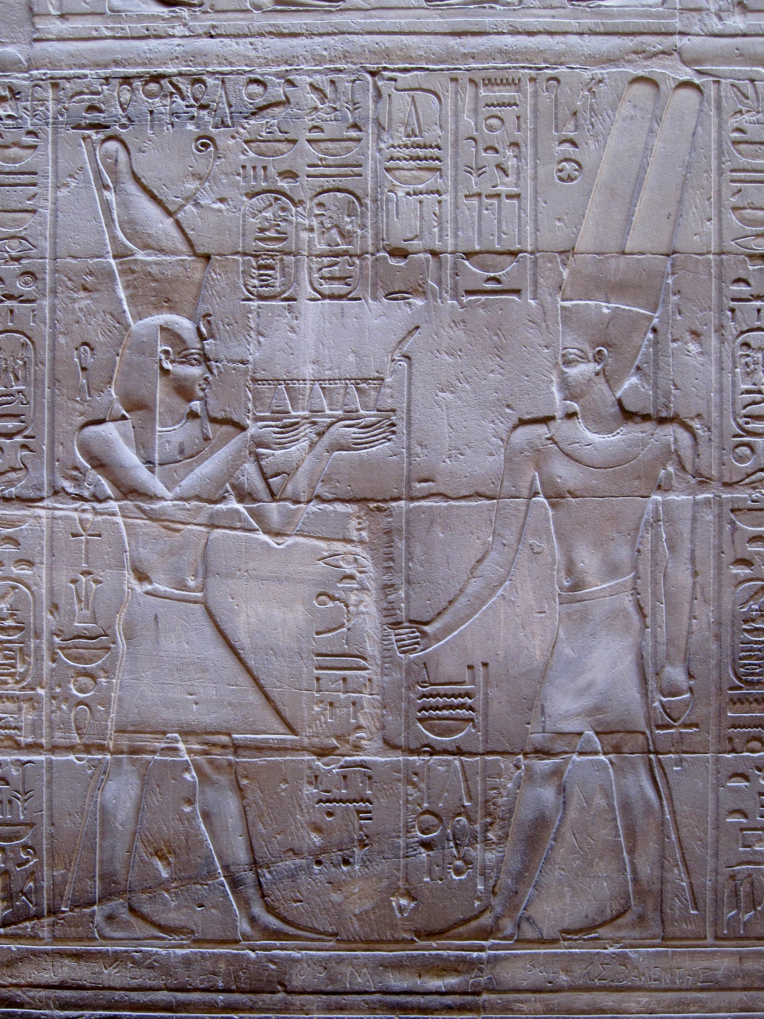 Relief im Heiligtum (Sanktuar) des Luxor-Tempels, Ägypten